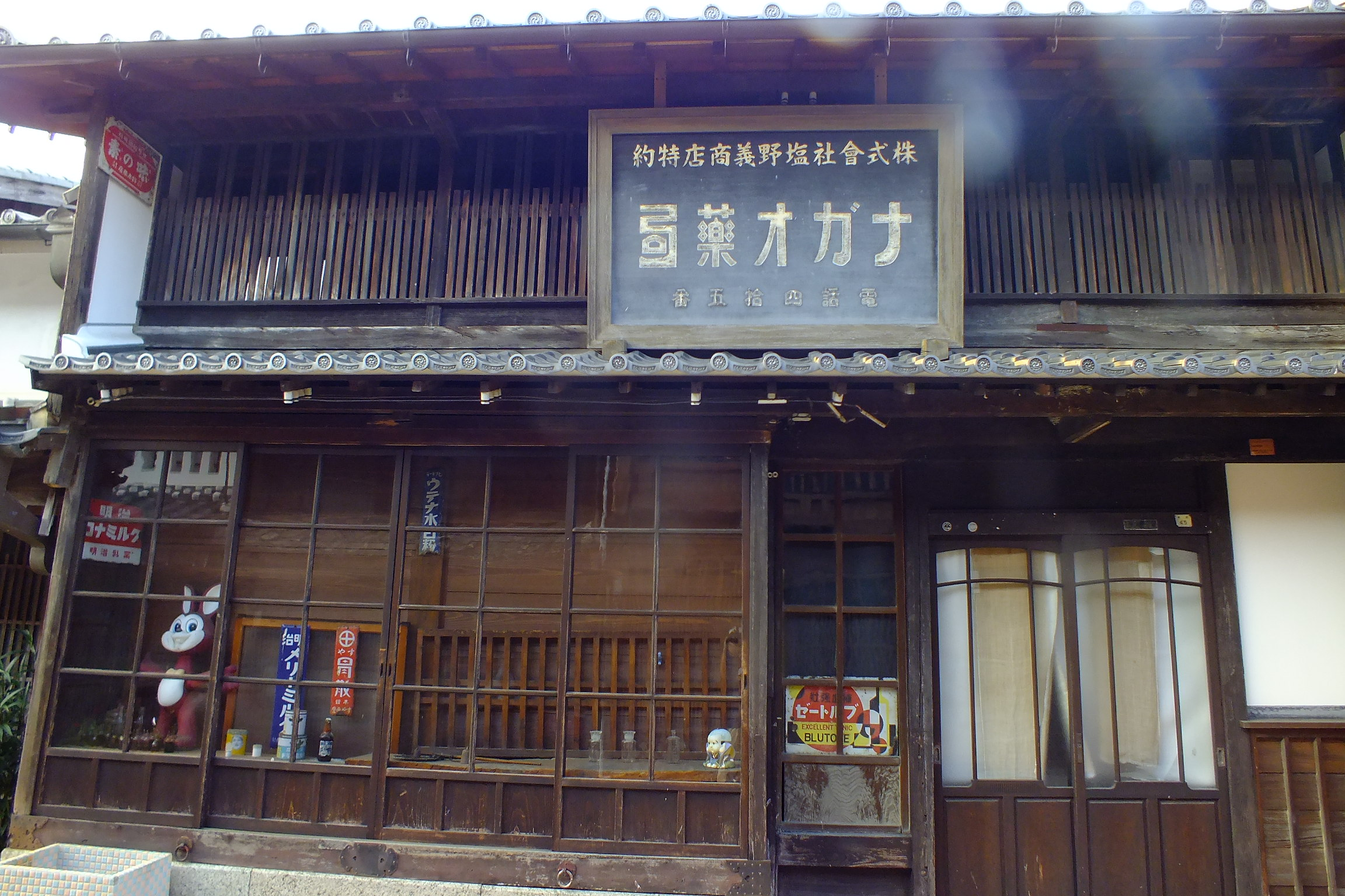 2016-08-05 Tokaido Seki Juku Kameyama City Mie,東海道五十三次 関宿